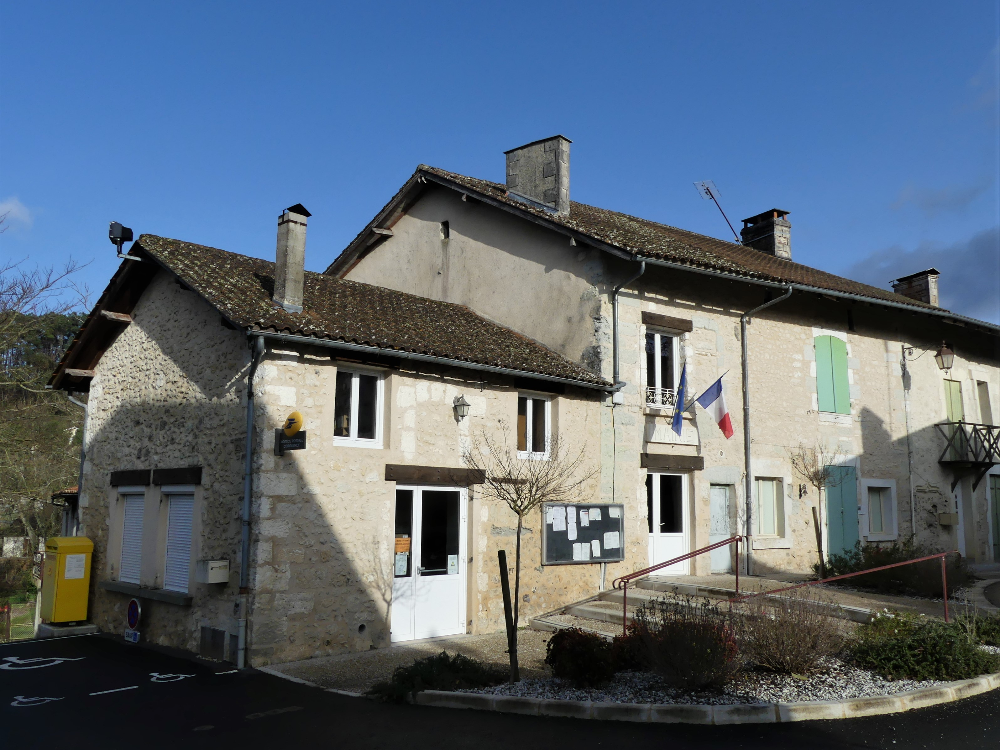 L'agence postale et la mairie de Biras, Dordogne, France.